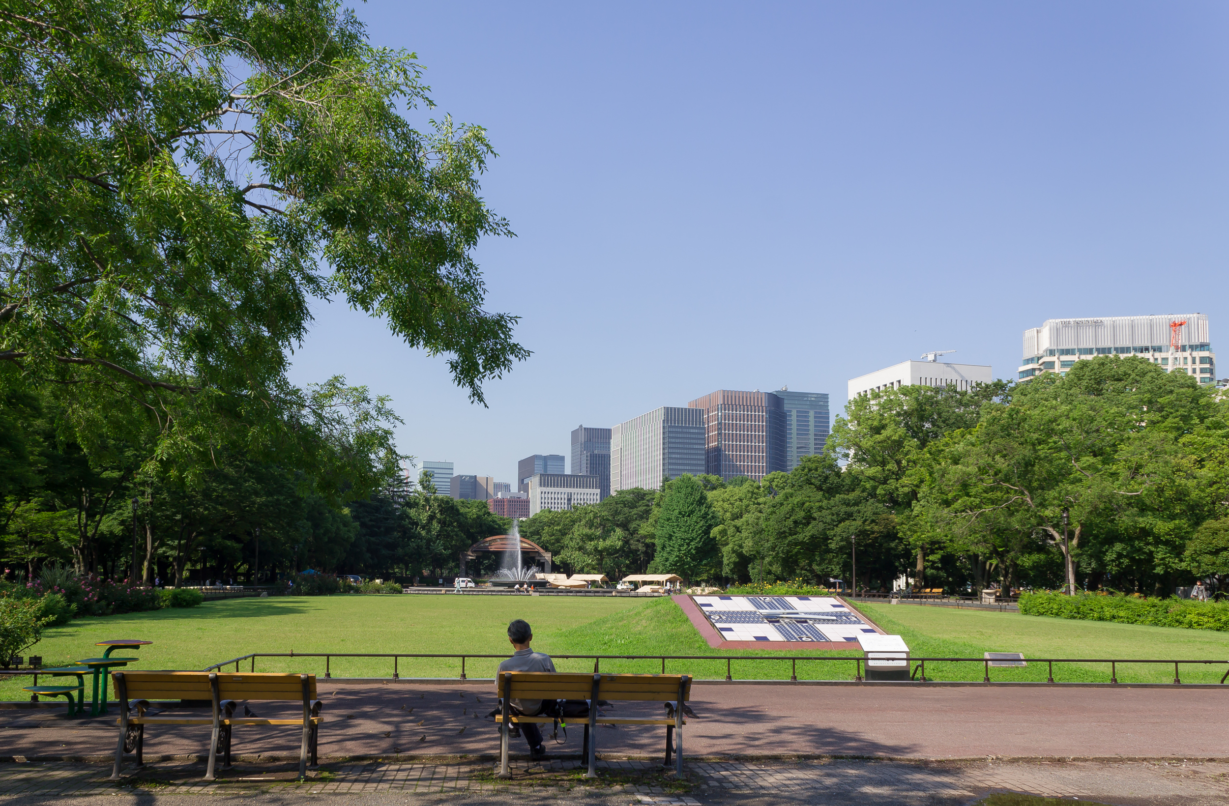 夏の日比谷公園